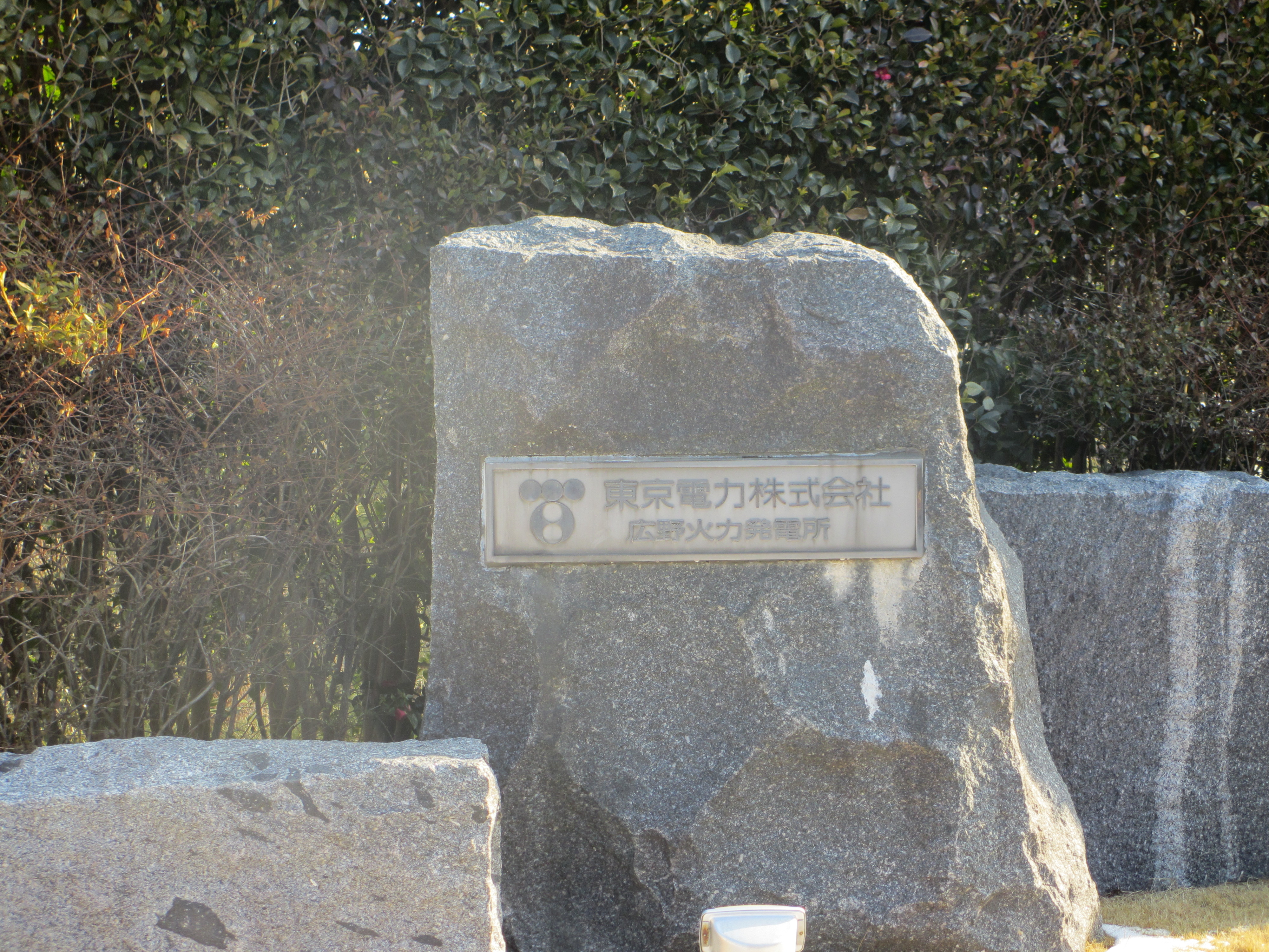 広野火力発電所の看板